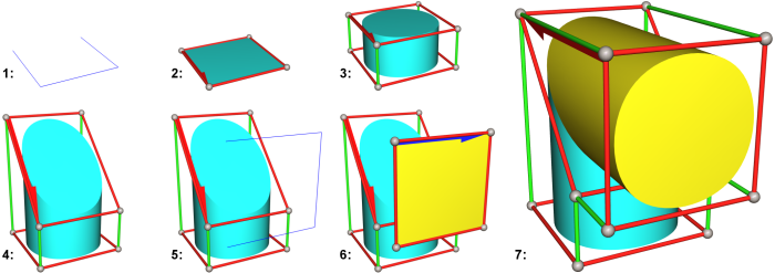 Selbsgemachtes Bild aus meiner Dissertation